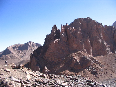 Sud de l'Algérie